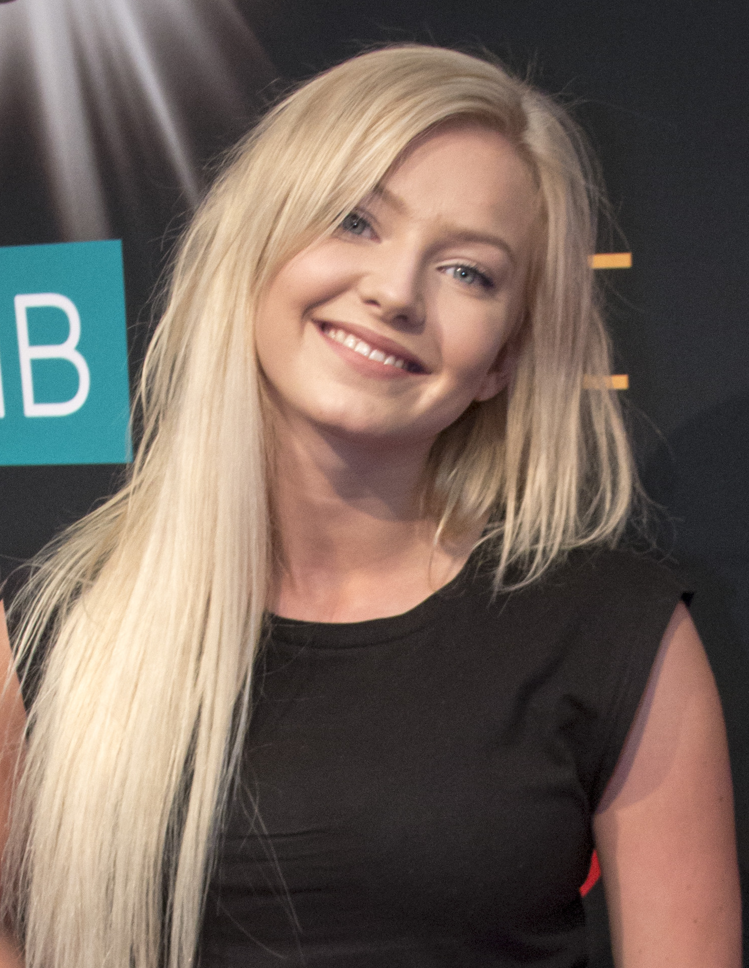 Smeplass på rød løper under VG-Lista 2014.